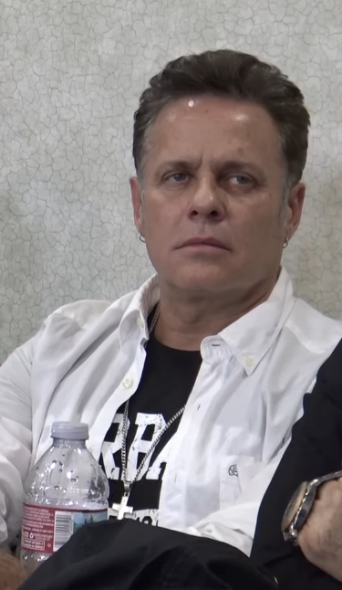 ¿Carmen Salinas es amiga de los papás de Donald Trump? regañan a Edith González x enseñar calzones